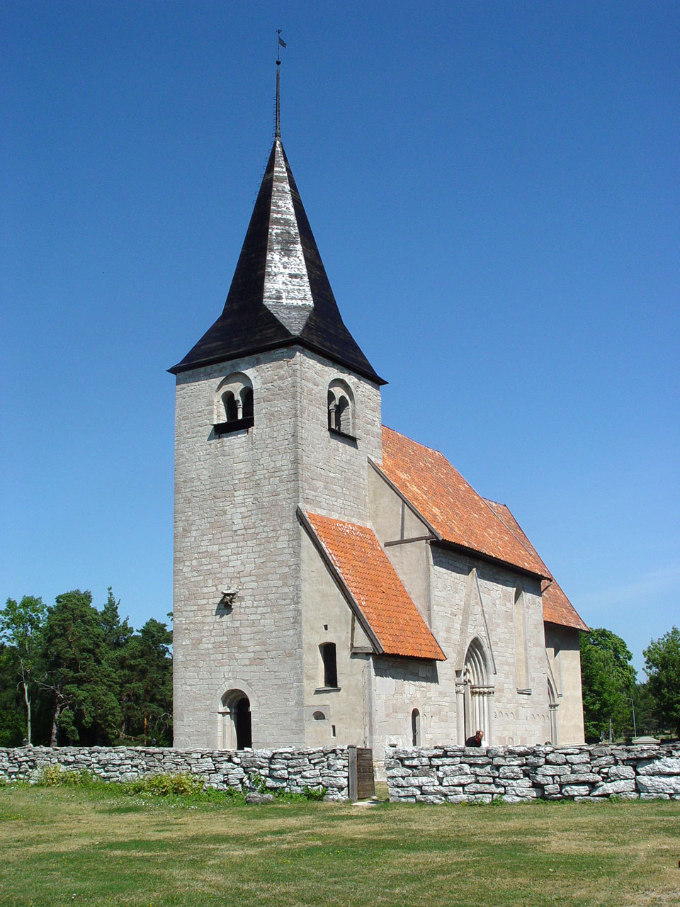 Bro kyrka (Gotland). Turm aus dem späten 12.Jh. Chor von 1236, Langhaus von 1300